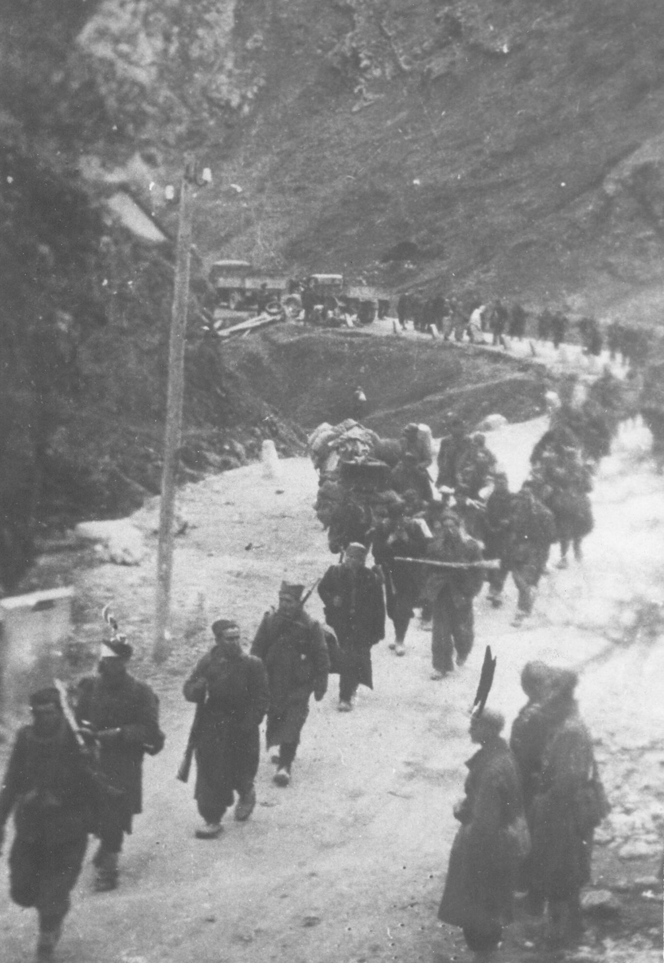 Srpskohrvatski / српскохрватски: Borci četvrtog bataljona Druge srpske brigade prebacuju se usiljenim maršem od Neretve na prostor između Prozora i Gornjeg Vakufa, gde se odigrala najžešća "Bitka za ranjenike" 1943. godine.